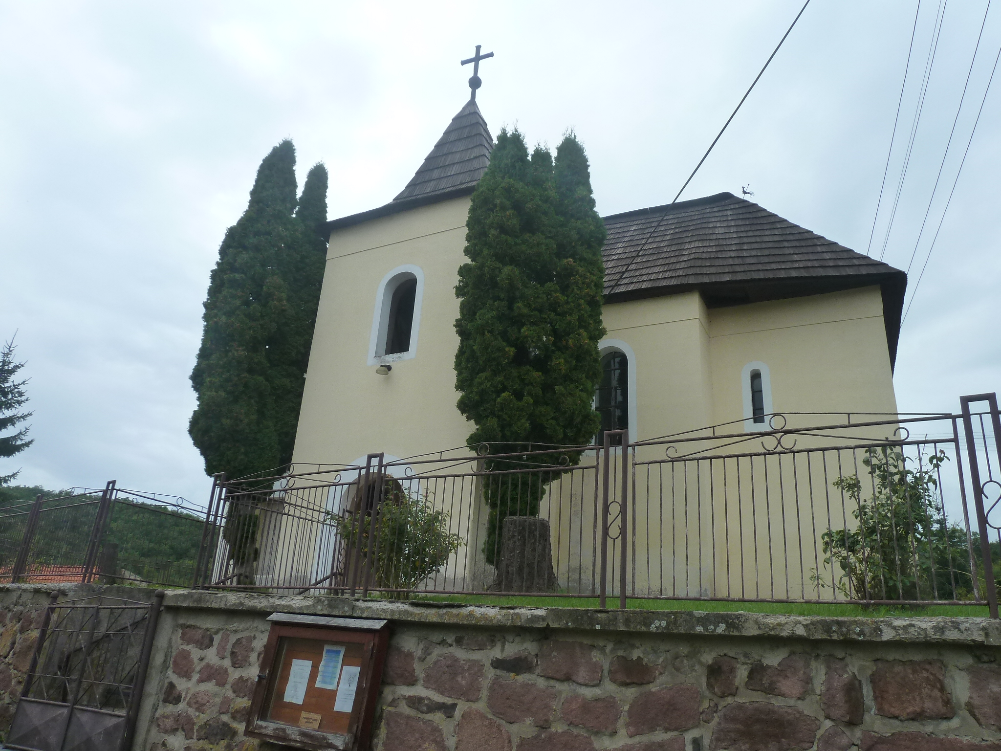 Renesančný kostol v Baďane